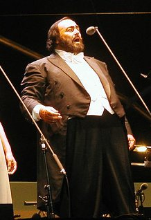 Foto di Luciano Pavarotti durante un concerto